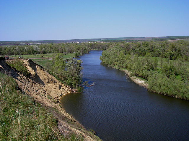 Терешка в районе Подгорного